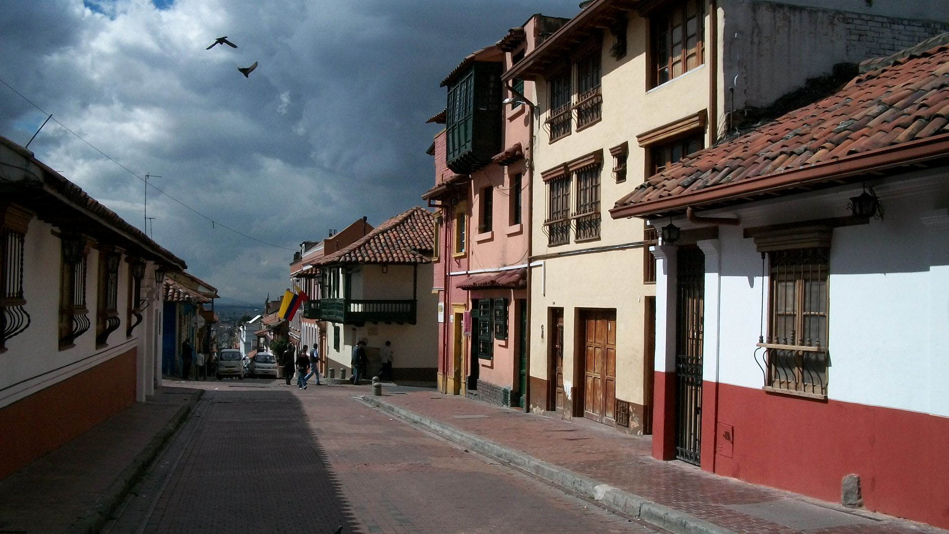 Calle del barrio La Candelaria en Bogotá, calle 10 con carrera 3. Colombia.